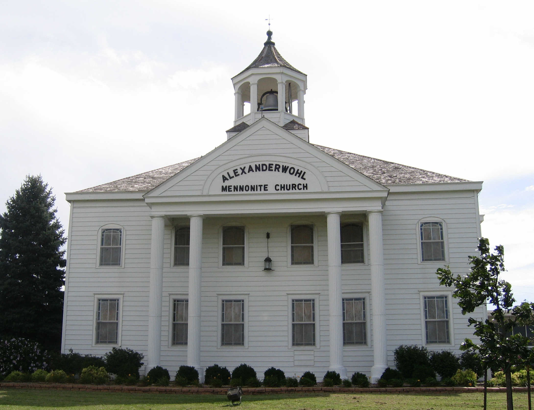 Alexanderwohl Mennonite Church, Goessel, Kansas, United States